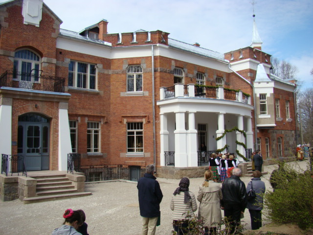 Uzņemts laikam: 2015 gada 25. aprīlī. Kategorija:Silraka attēli